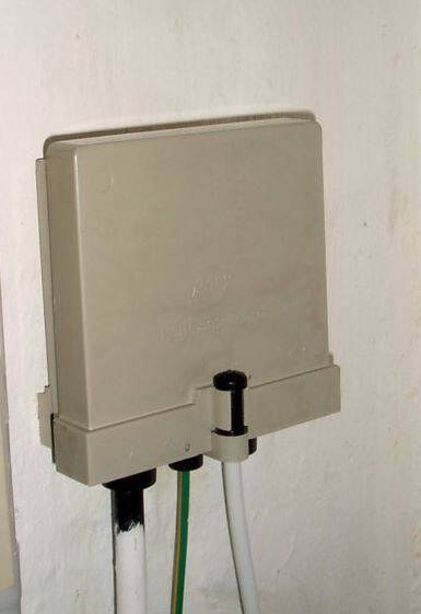 HÜP 862 von Astro (baugleich zum EVK 59 von Kathrein). Ist der Netzabschluss der NE3 bei Kabelfernsehnetzen.